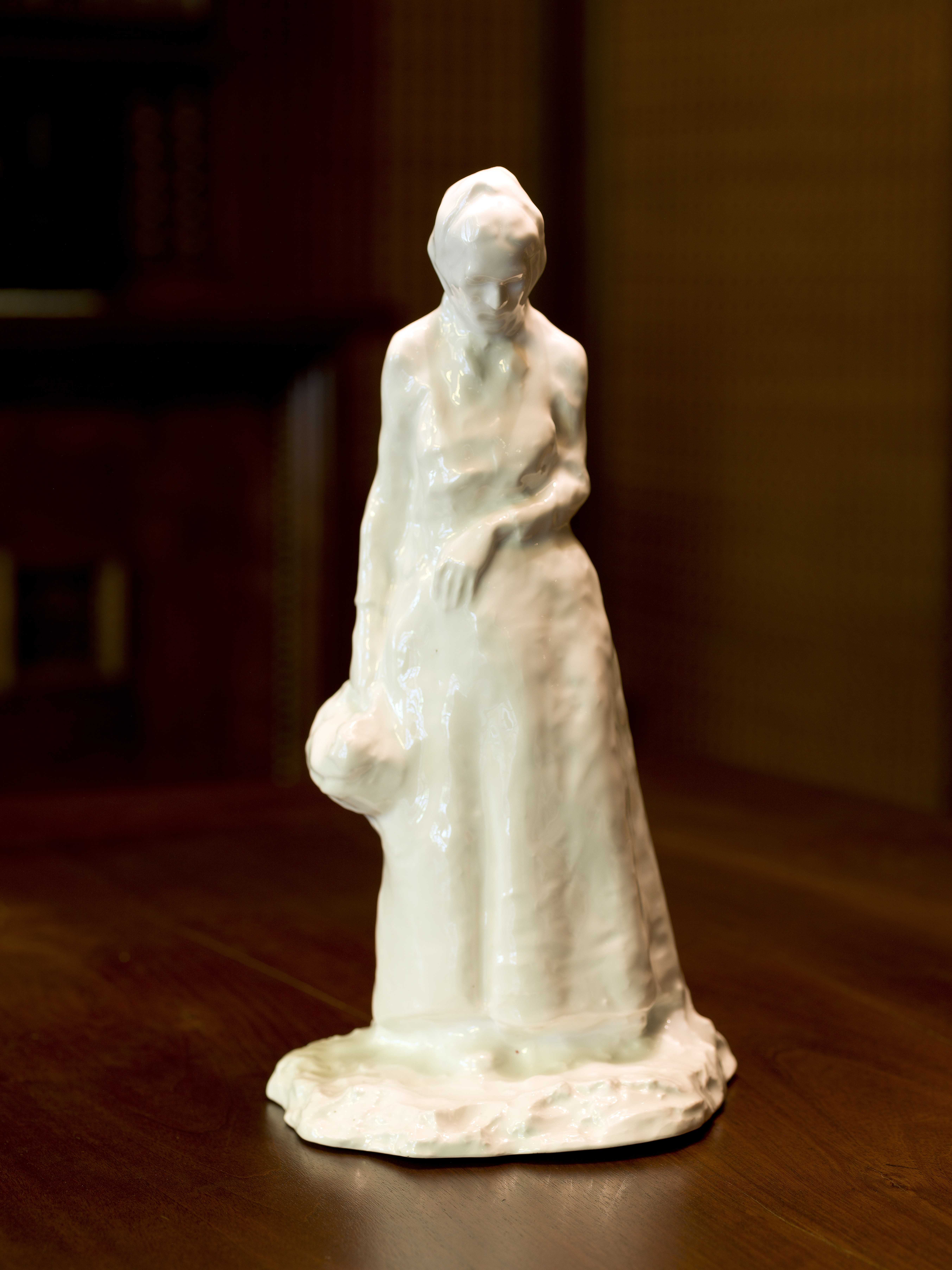 Escultura La mujer del hatillo, de Eneique Casanovas